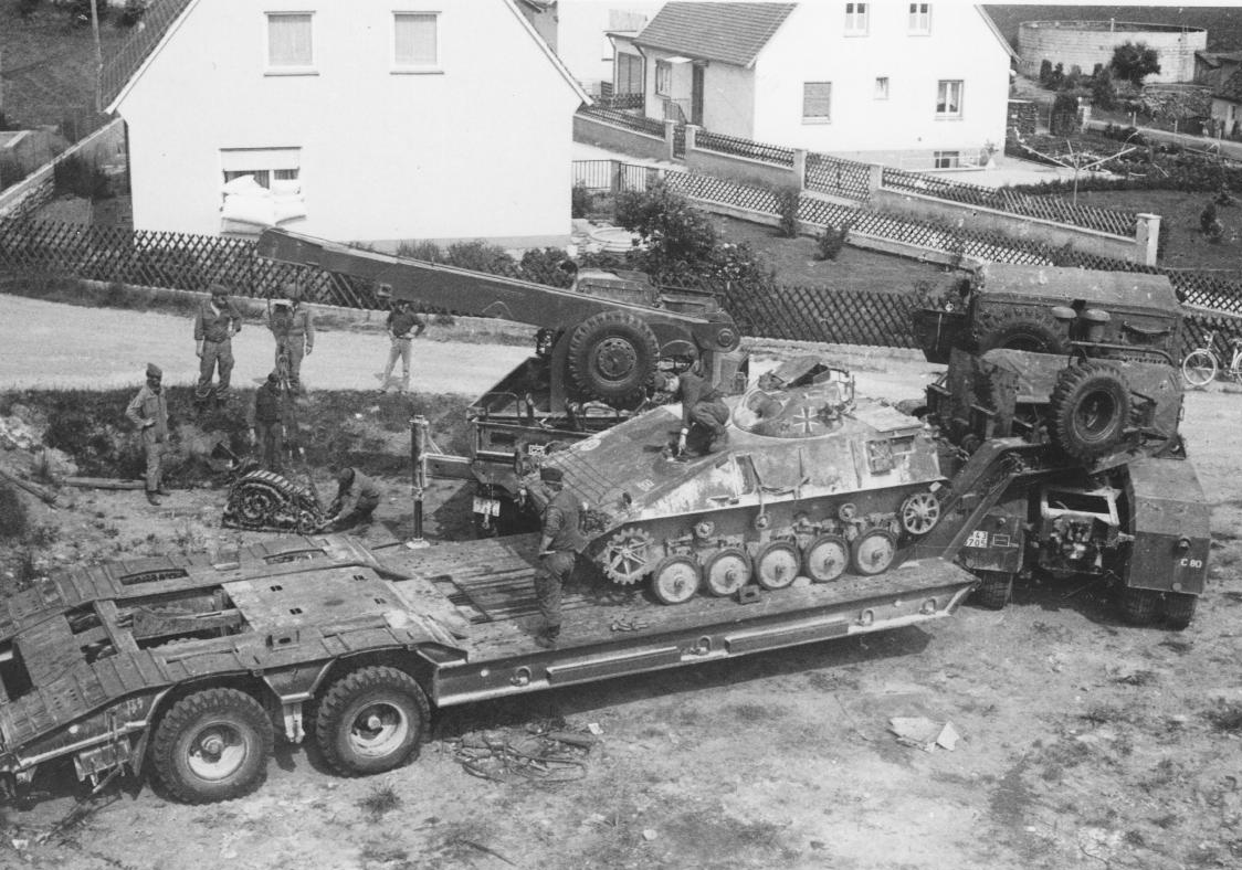 Bergung eines Schützenpanzers Spz kurz Hotchkiss auf einem Tieflader mit Faun-Zugmaschine 1212/45